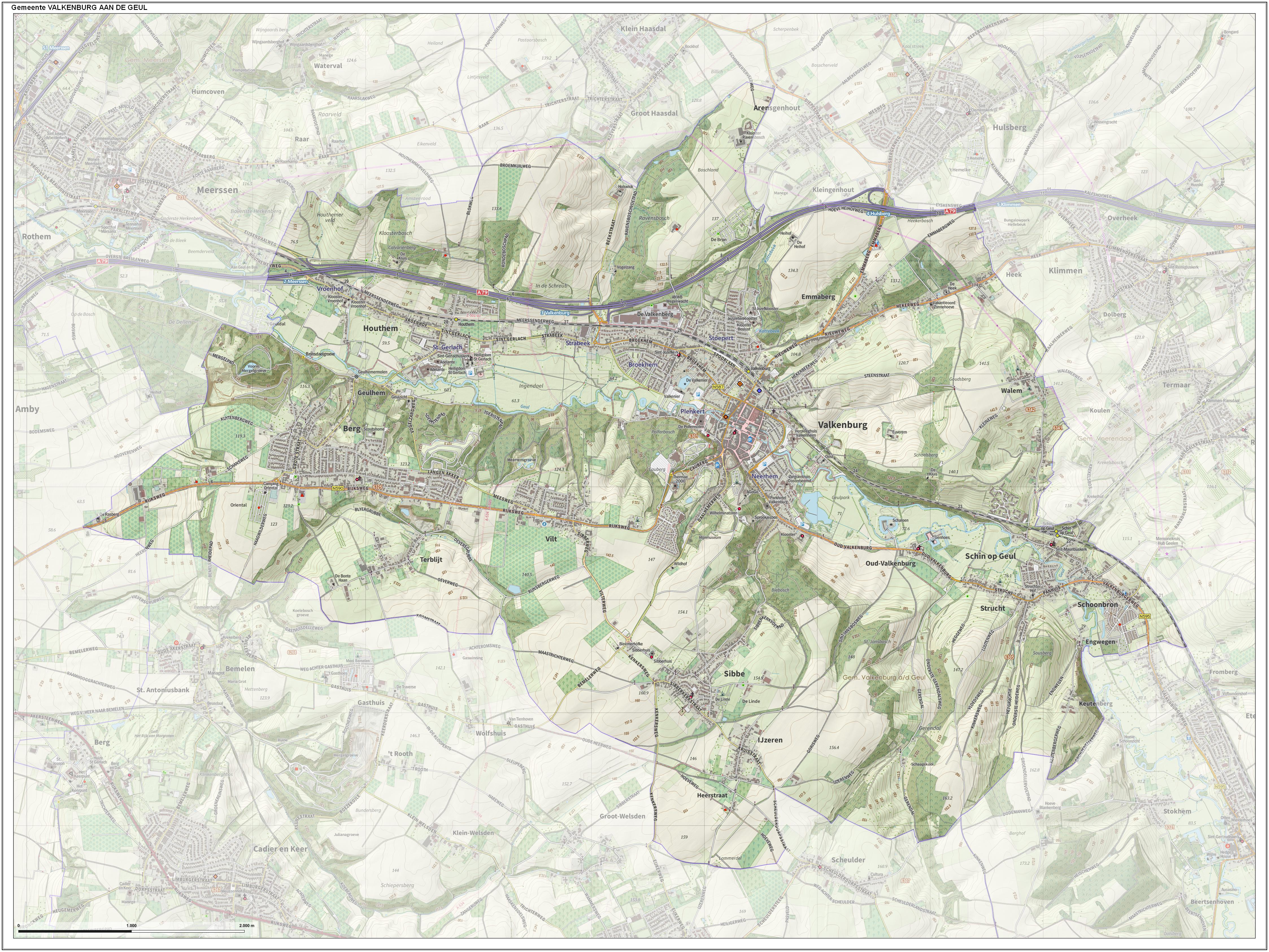 Topografische gemeentekaart. Resolutie: 400 pixels/km. Kaartbeeld samengesteld uit de open geodata van de Top10NL en Top25namen (Kadaster), Creative Commons-BY licentie. Gebouwvlakken uit open geodata BAG extract. Wegen uit de OpenStreetMap, OpenStreetMap community. Reliëfschaduw uit de Actuele Hoogtekaart AHN2. Samenstelling en kleurenschema: Jan-Willem van Aalst, met QGIS. Zie ook de Legenda.